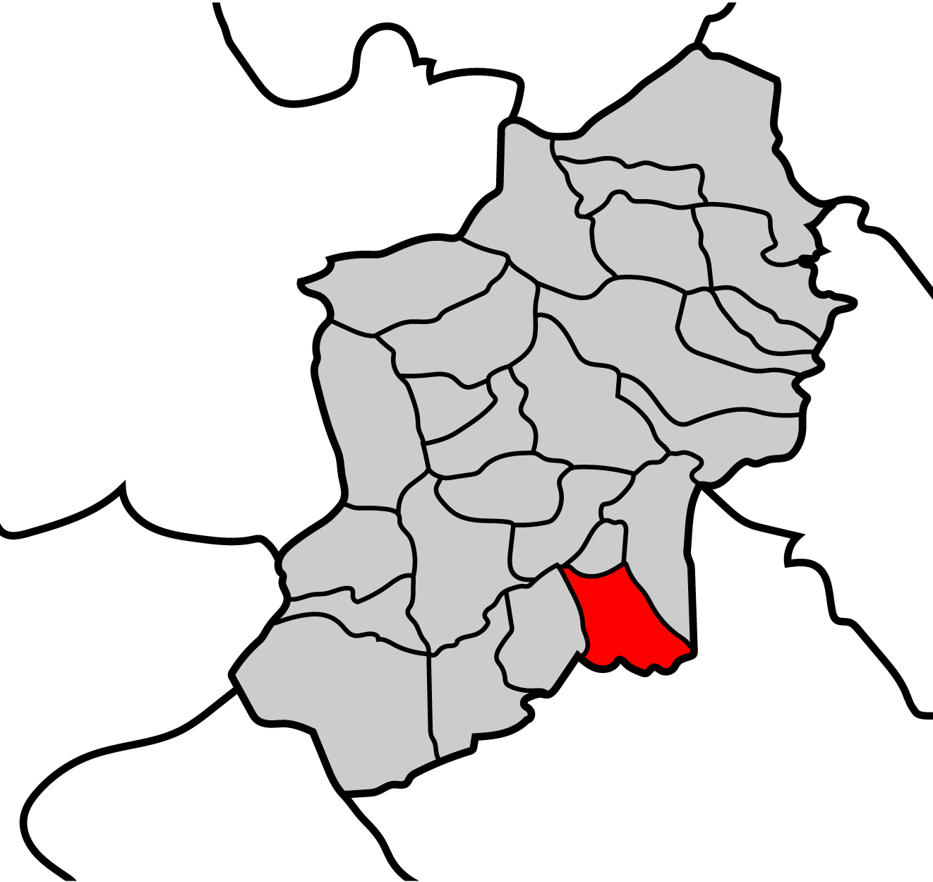 Mapa de la parroquia de Morcelle ayuntamiento de Becerreá